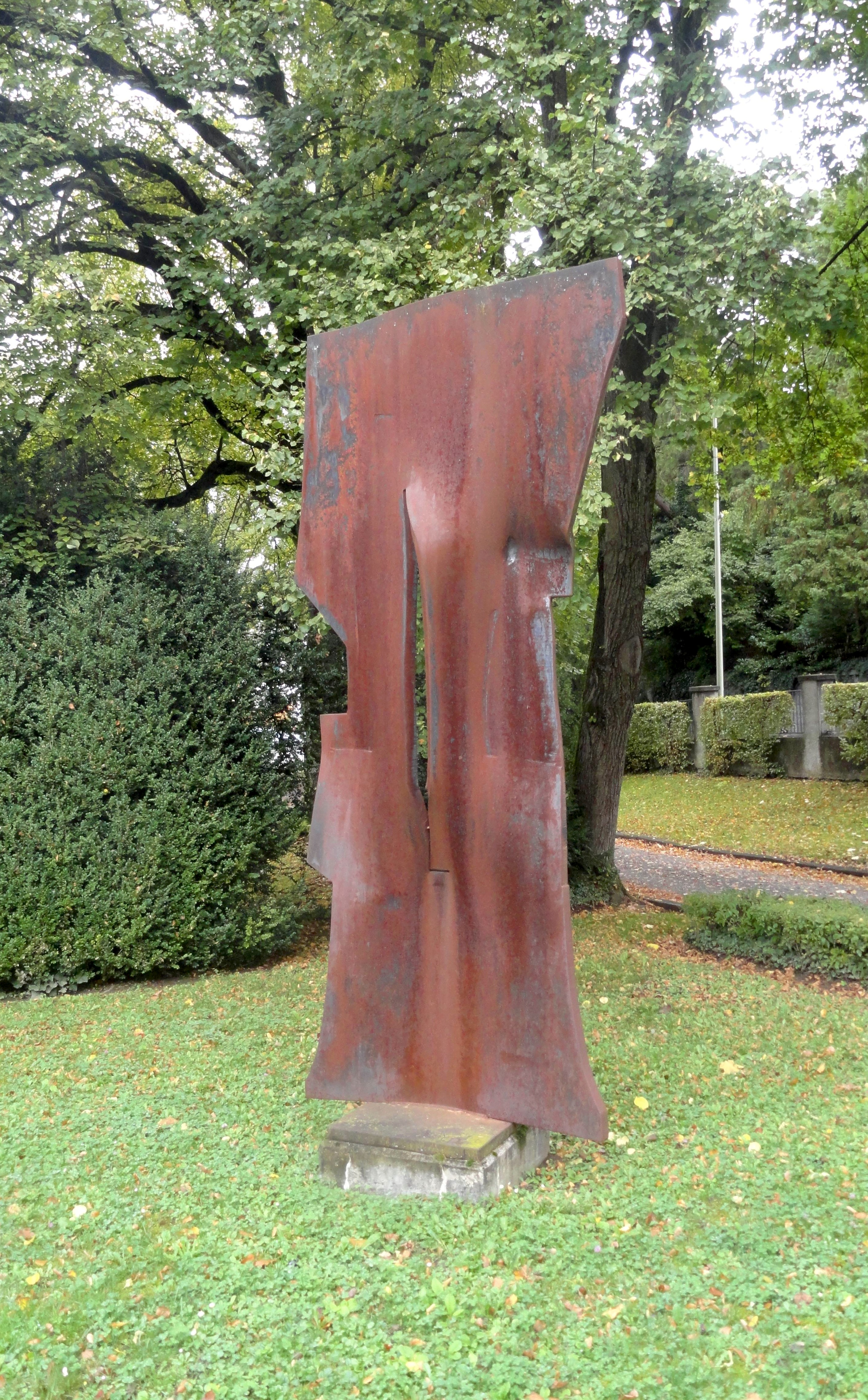 Oscar Wiggli (*1927): LAGAD (1992) Eisen, geschmiedet, 335 cm hoch.Park Villa Meier-Severini, Zollikon